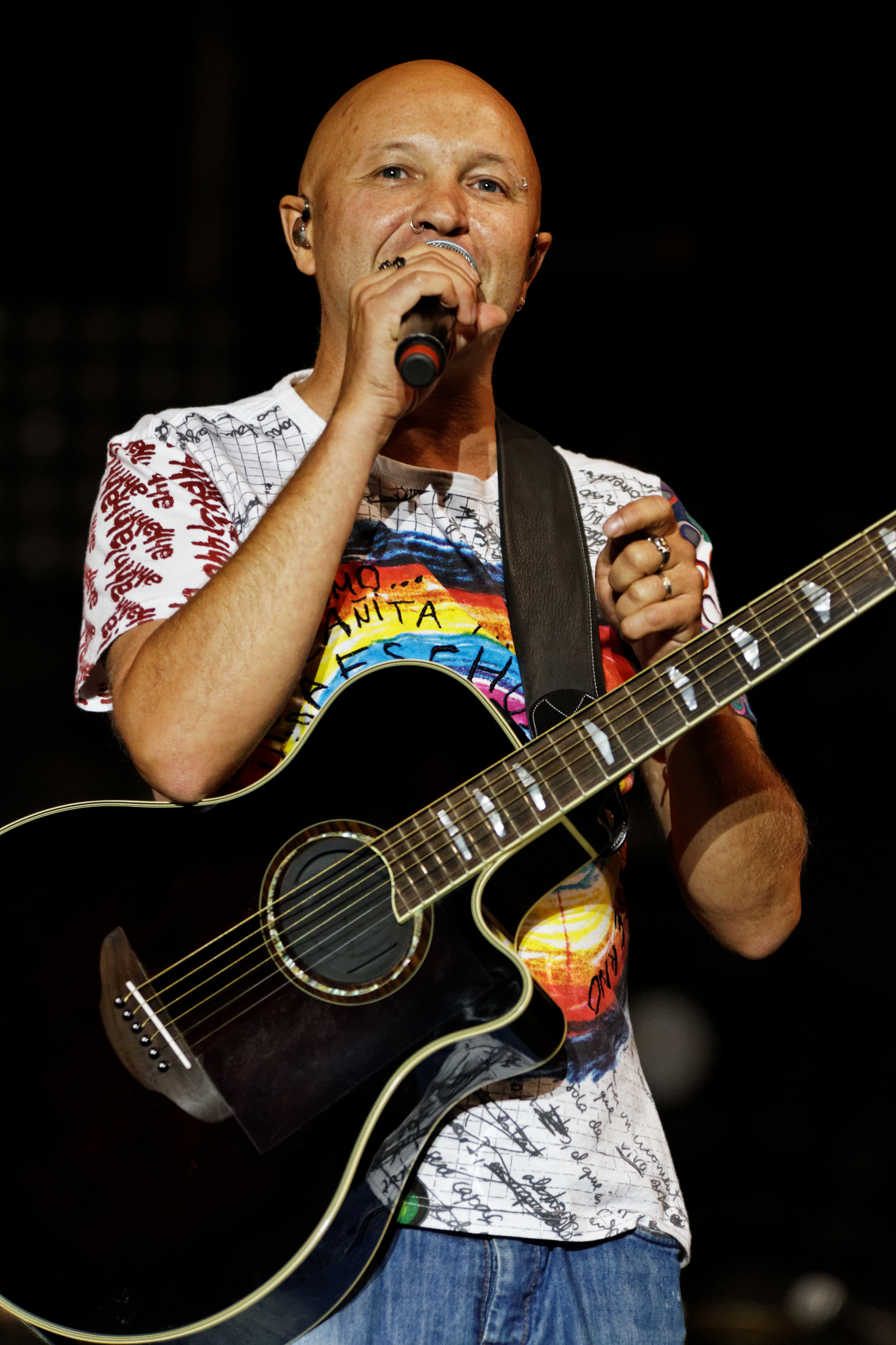 Tryo en concert sur la grande scène lors de la fête de l'Humanité 2013.